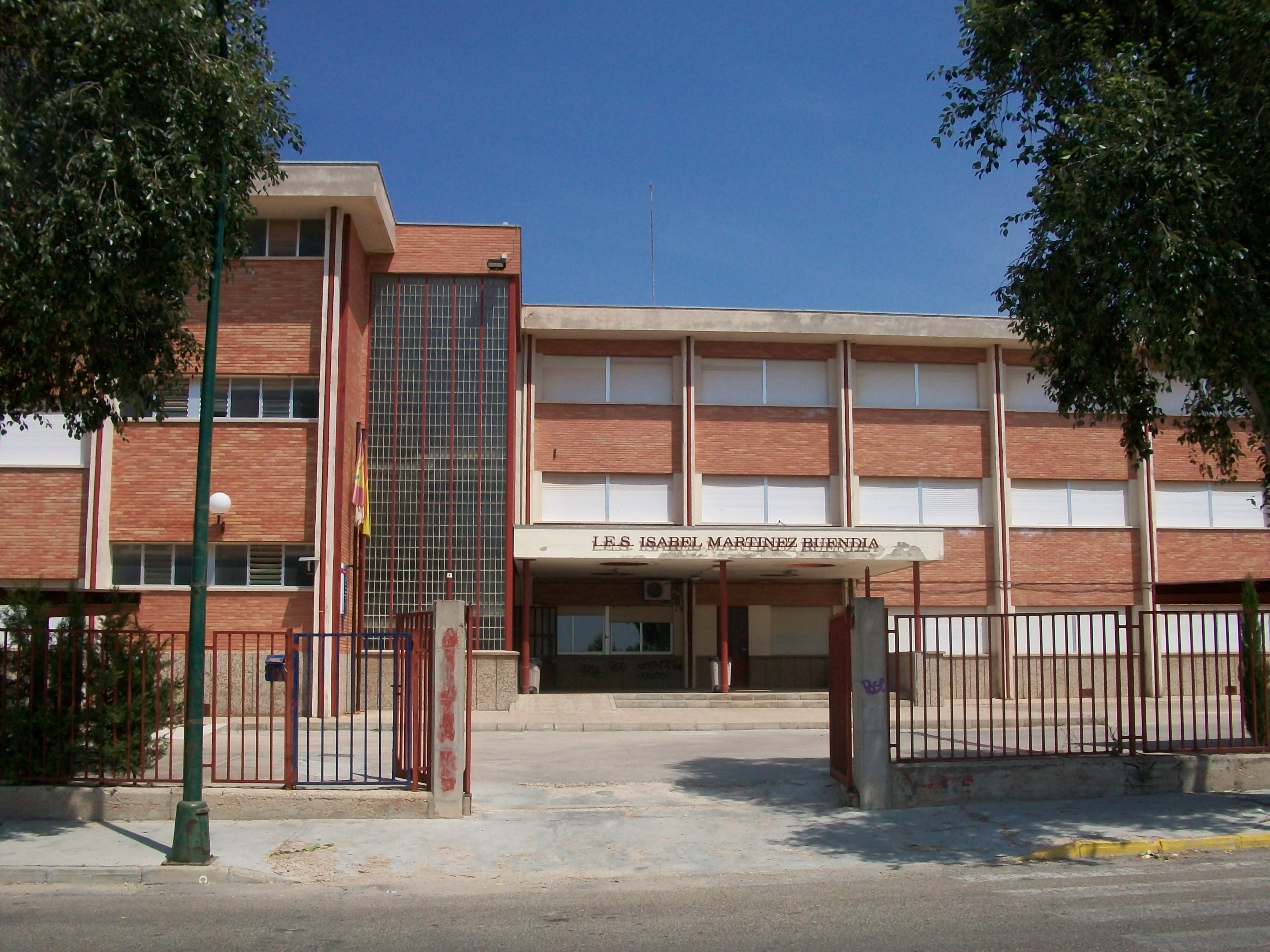 IES Isabel Martínez Buendía en Pedro Muñoz.